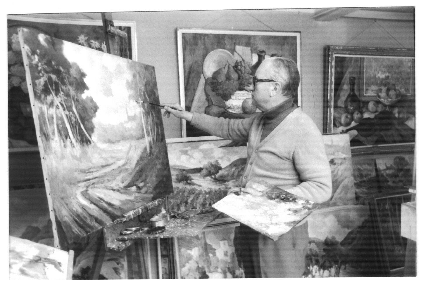 Isidre Mercade Ferrando pintando en su estudio.